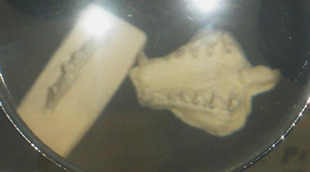 Fossil of Deltatheridium, an extinct mammal - Took the picture at Museo di Paleontologia di Firenze